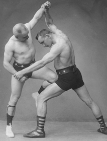 Paul Tirkkonen and Iivari Tuomisto